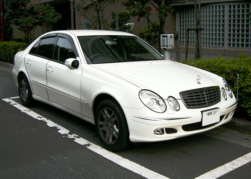 Mercedes-Benz_E-Class_E280